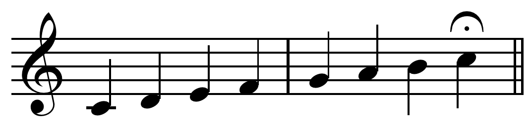 Diatonic scale on C.